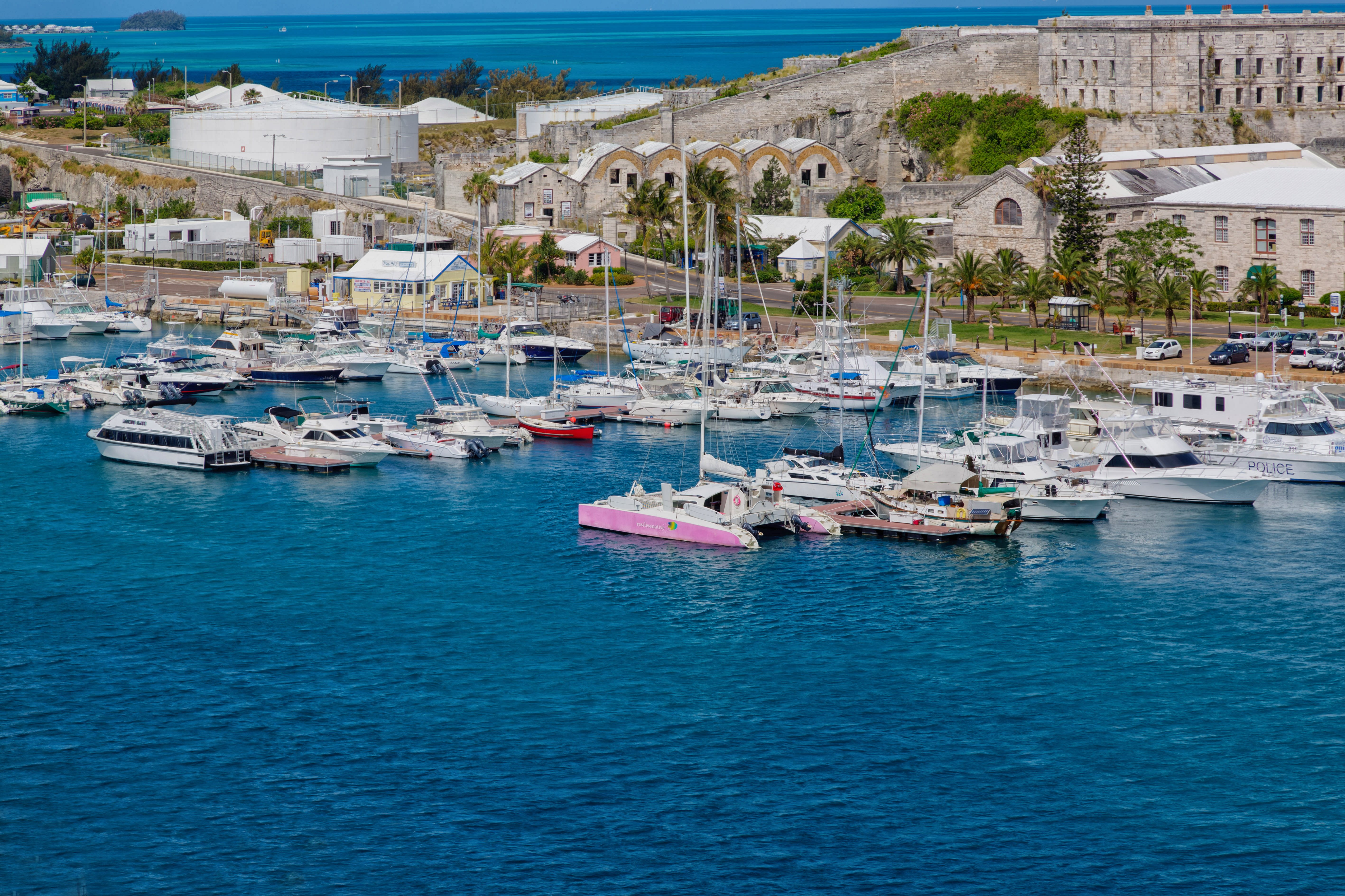 Welcome to Bermuda (1)